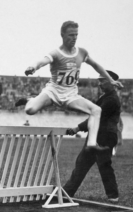 Olympische Spelen 1928 Amsterdam, Nederland : In de finale van de 3000 meter steeple-chase leidt de Fin Anderson voor landgenoot Loukola, die het goud zou winnen.